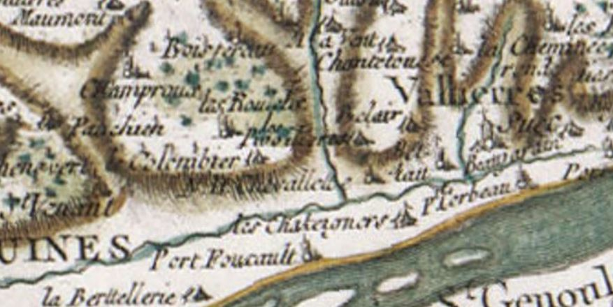 site de la Chevallette ; extrait carte de Cassini. Communes Fondettes -Vallières